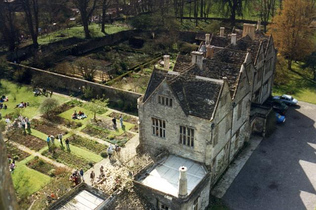 Mells Manor